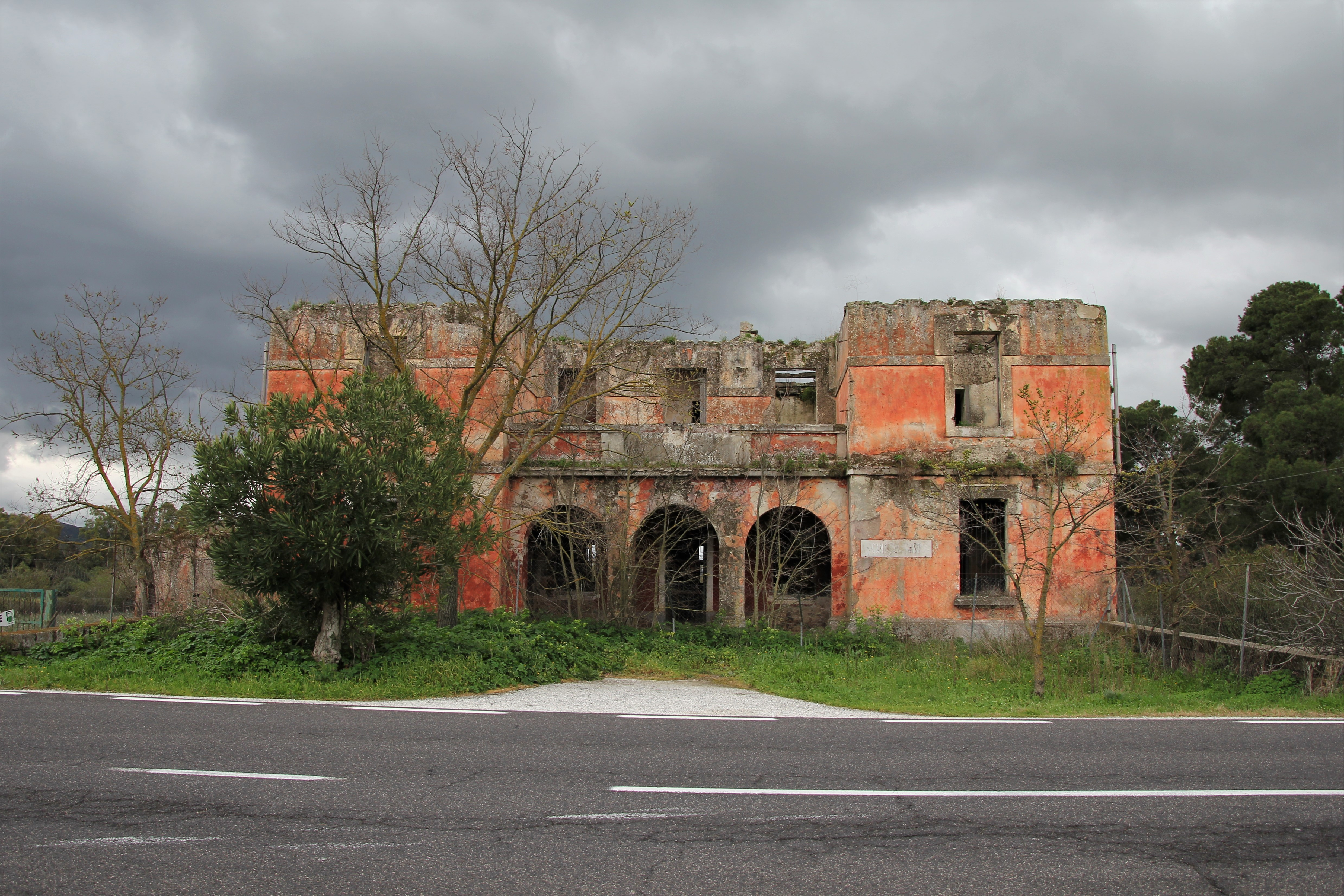 Illorai, casa cantoniera del Tirso